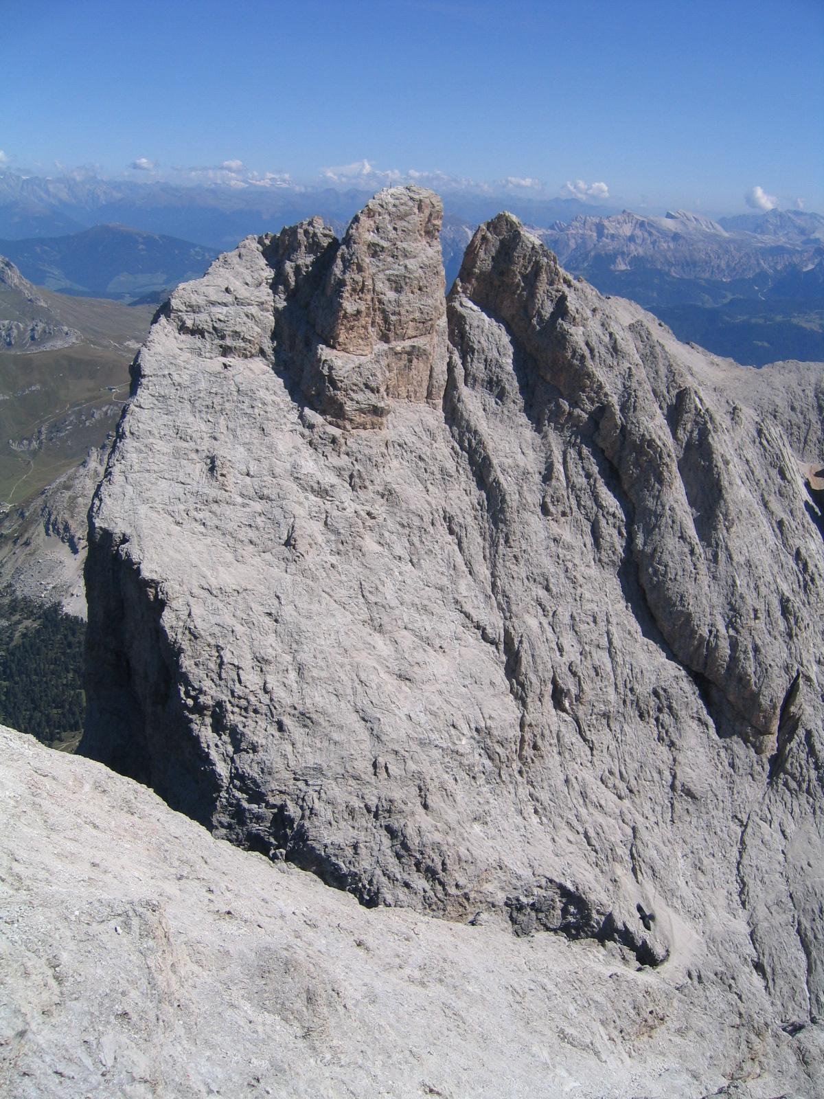 Furchetta vom Sass Rigais aus gesehen